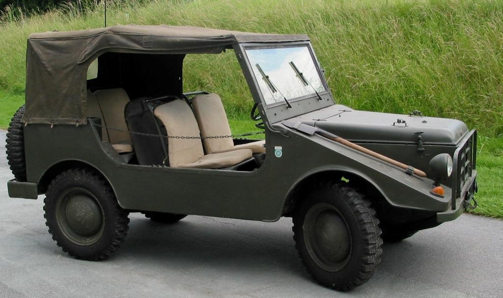 DKW MUNGA Geländewagen, Vorserienfahrzeug Baujahr 1955 in Kunststoff